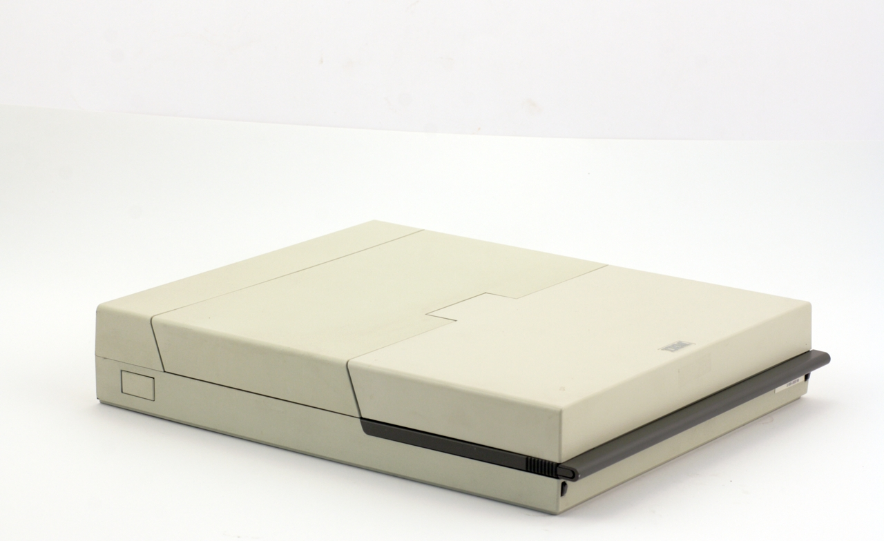 Il case in metallo si presenta come un parallelepipedo avente sul fronte una maniglia retrattile e uno sportello che, aperto, si rivela essere il monitor LCD da 10" (monocromo con risoluzione testo 80x25 e grafica 640x200 oppure 320x200). A case aperto, simmetricamente ai lati del monitor, sono visibili due drive per floppy disk da 3,5" (720 kb ciascuno), e in basso la tastiera a 79 tasti ROM 64 kb. Processore: Intel 80C88a 8 bitFrequenza: 4.77 MHzRAM: 256-640 512 kb. Notizie storico-critiche Computer portatile IBM 5140 è noto sul mercato italiano con il nome di "Ventiquattrore". Con il cabinet disegnato nell'1985 dal designer tedesco Richard Sapper e prodotto dall'americana IBM a partire dal 1986, è stato uno dei primi portatili apparsi sul mercato. Il monitor LCD e la tastiera sono estraibili e intercambiabili; la parte posteriore del 5140 può alloggiare una stampante che prosegue, nella forma, la linea del computer. Da questa versatilità deriva l'altro suo nome di "Convertible". A macchine di questo tipo si deve il grande merito di aver reso l'informatica una tecnologia alla portata di tutti.